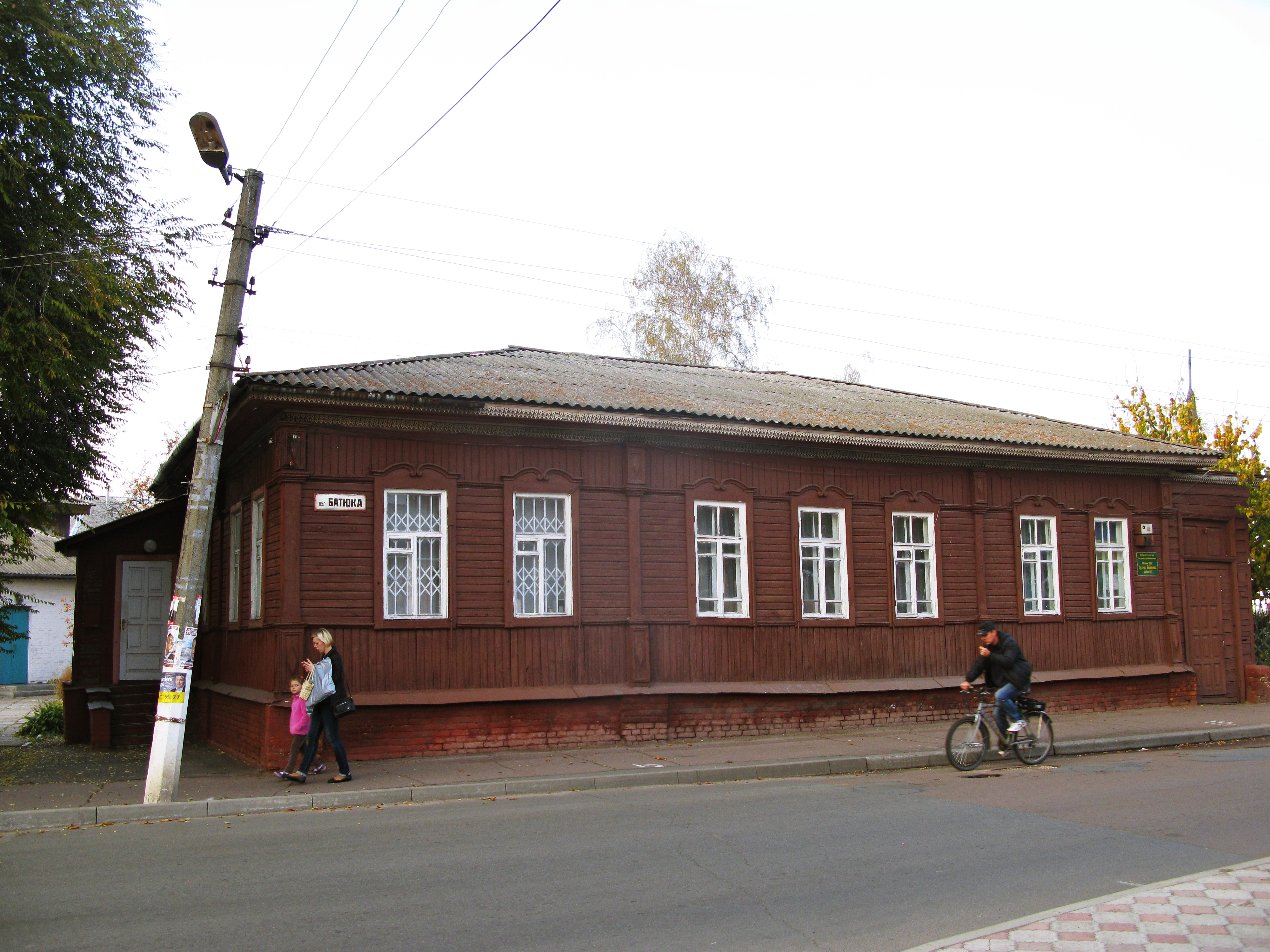 Будинок, у якому проживала М.Є. Малиш-Федорець, Ніжин, вул. Батюка, 8